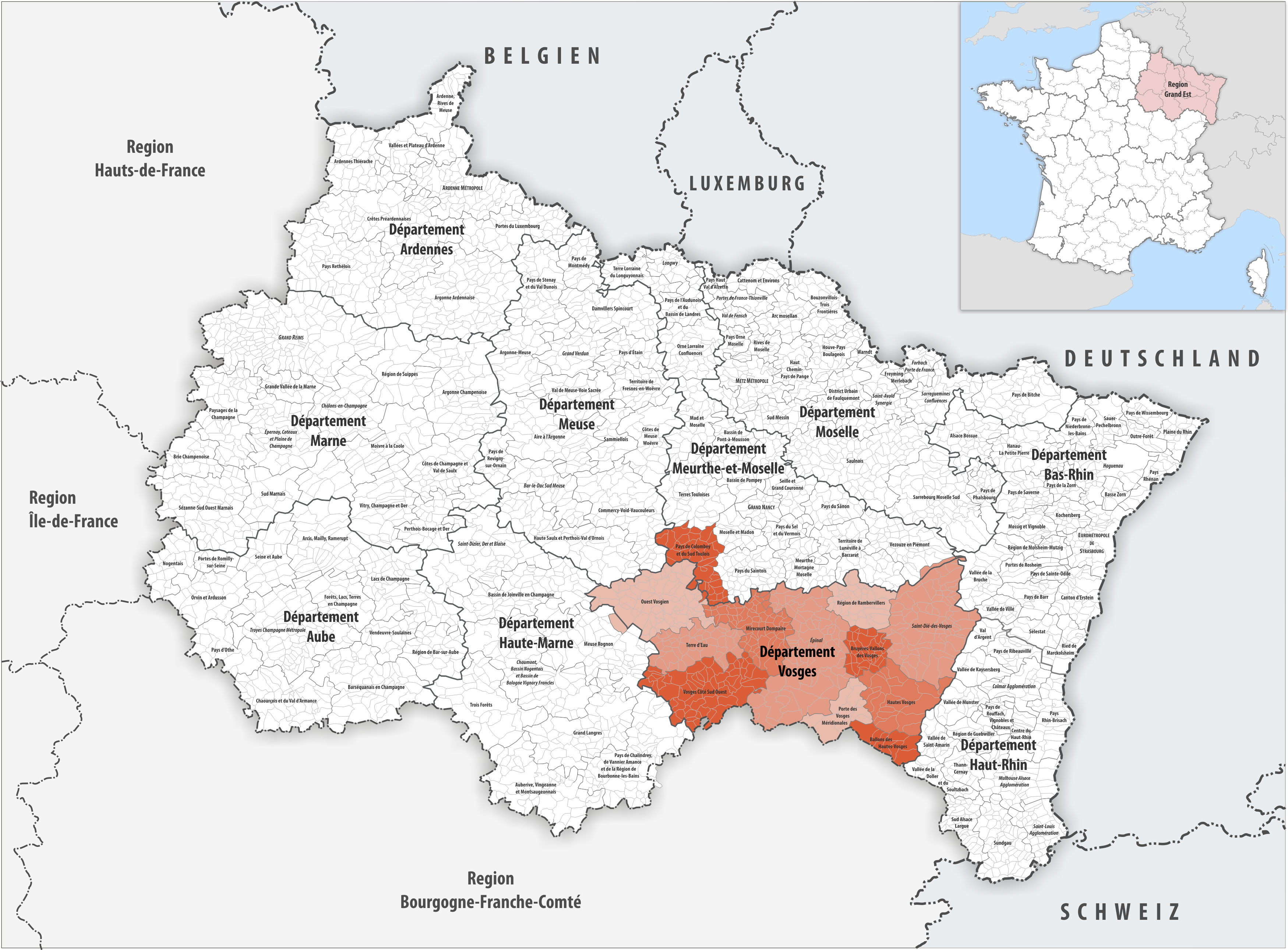 Gemeindeverbände im Département Vosges